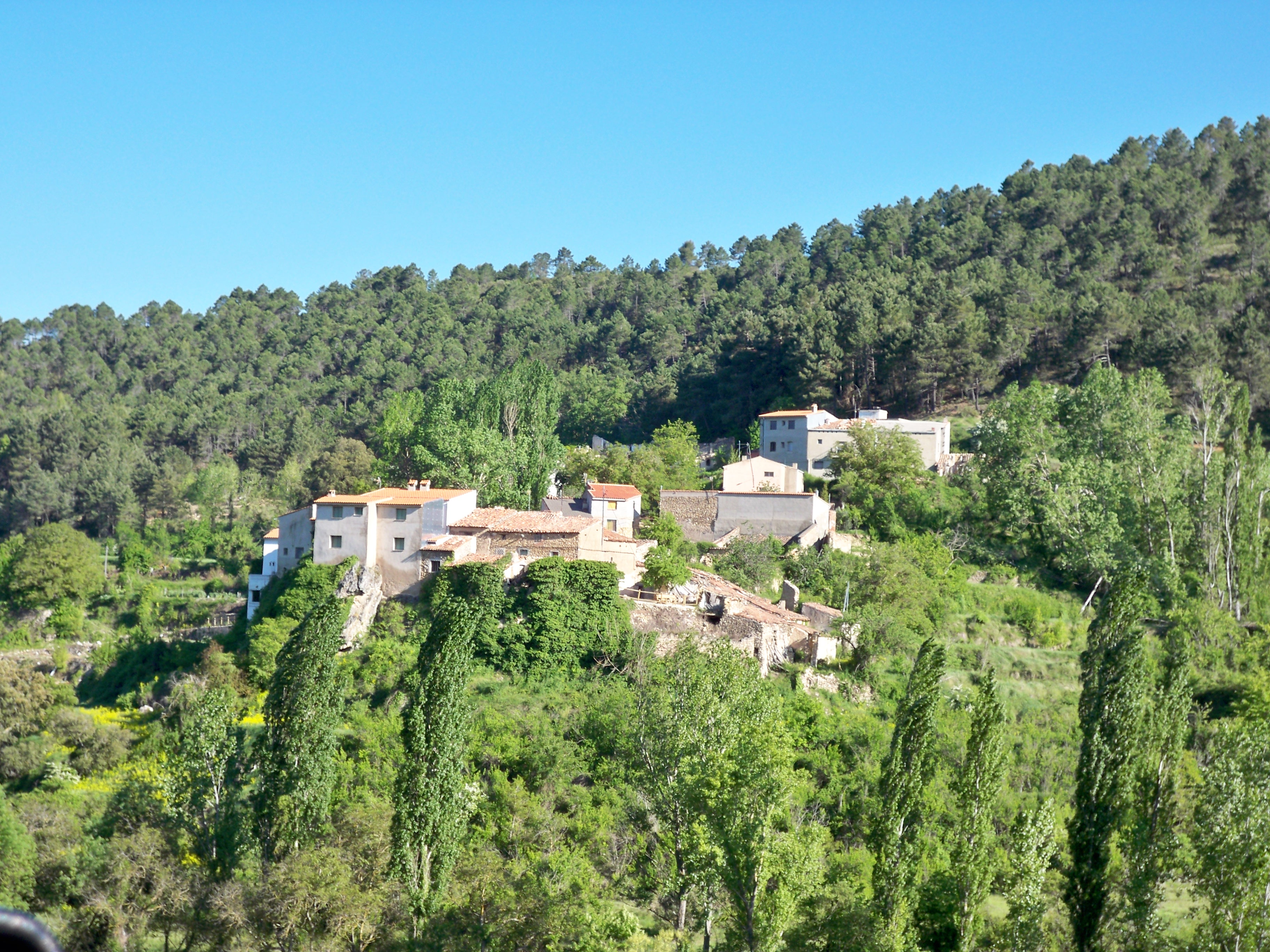 Vista panorámica de la localidad de Cañada de Morote (Término Municipal de Molinicos (Albacete))